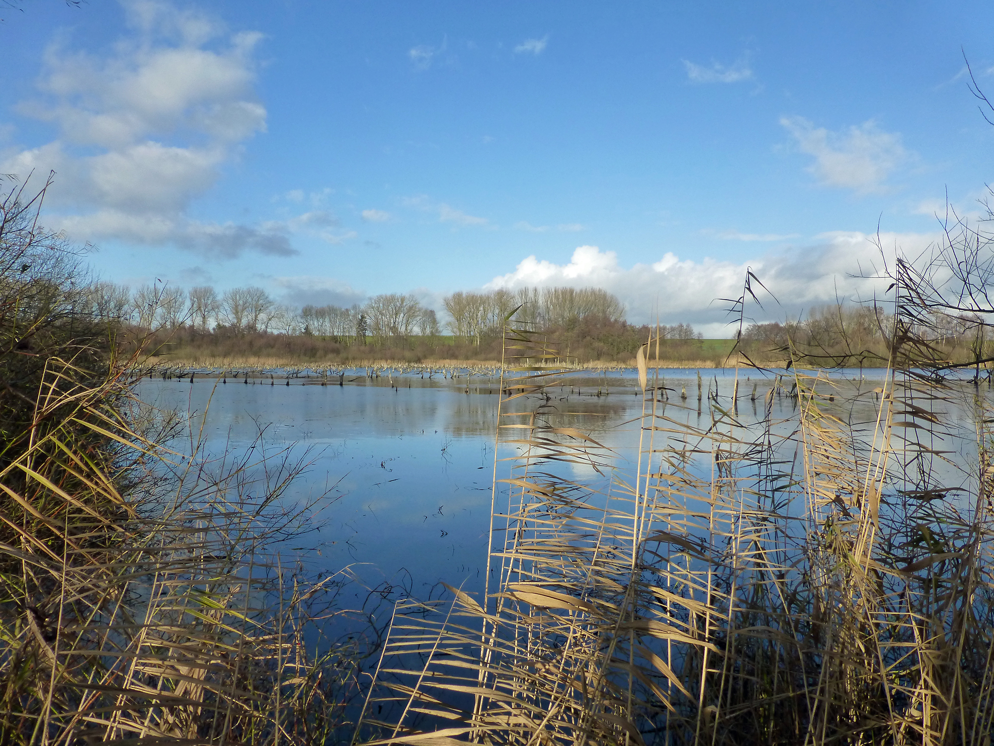 Lutteranger bei Seeburg